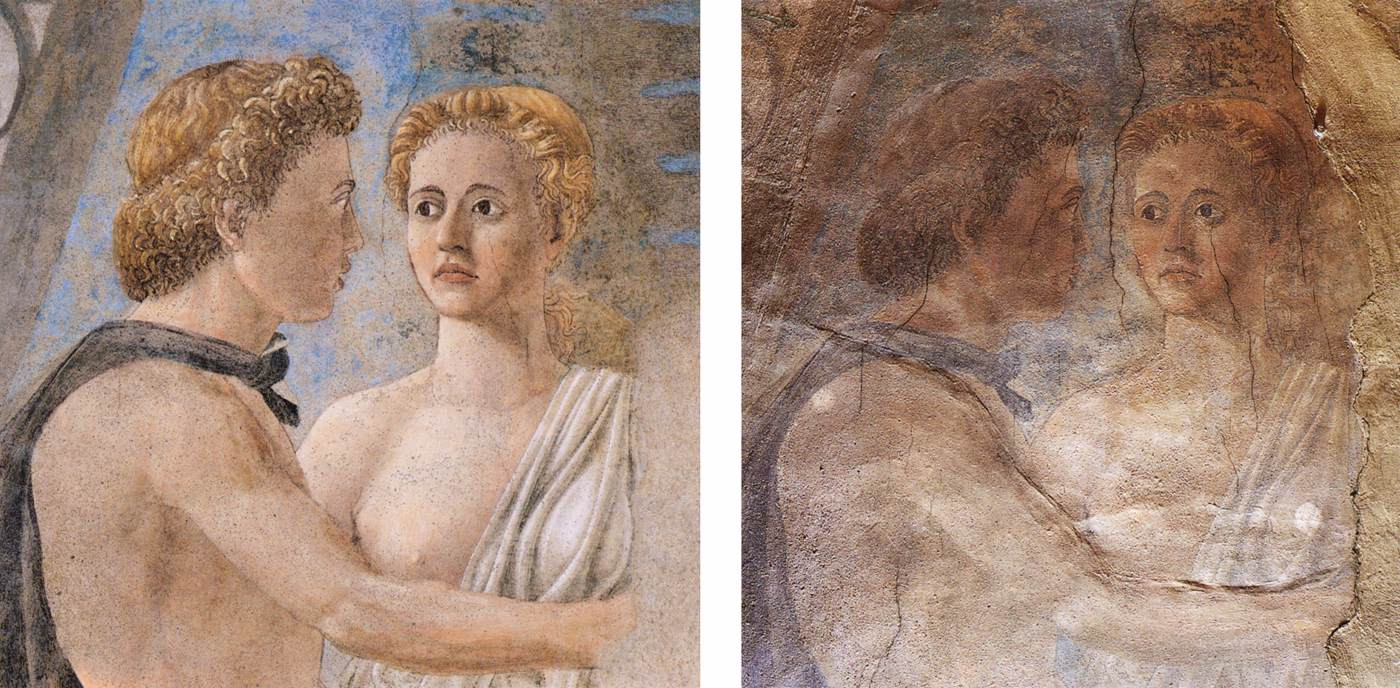 A detail after and before restoration